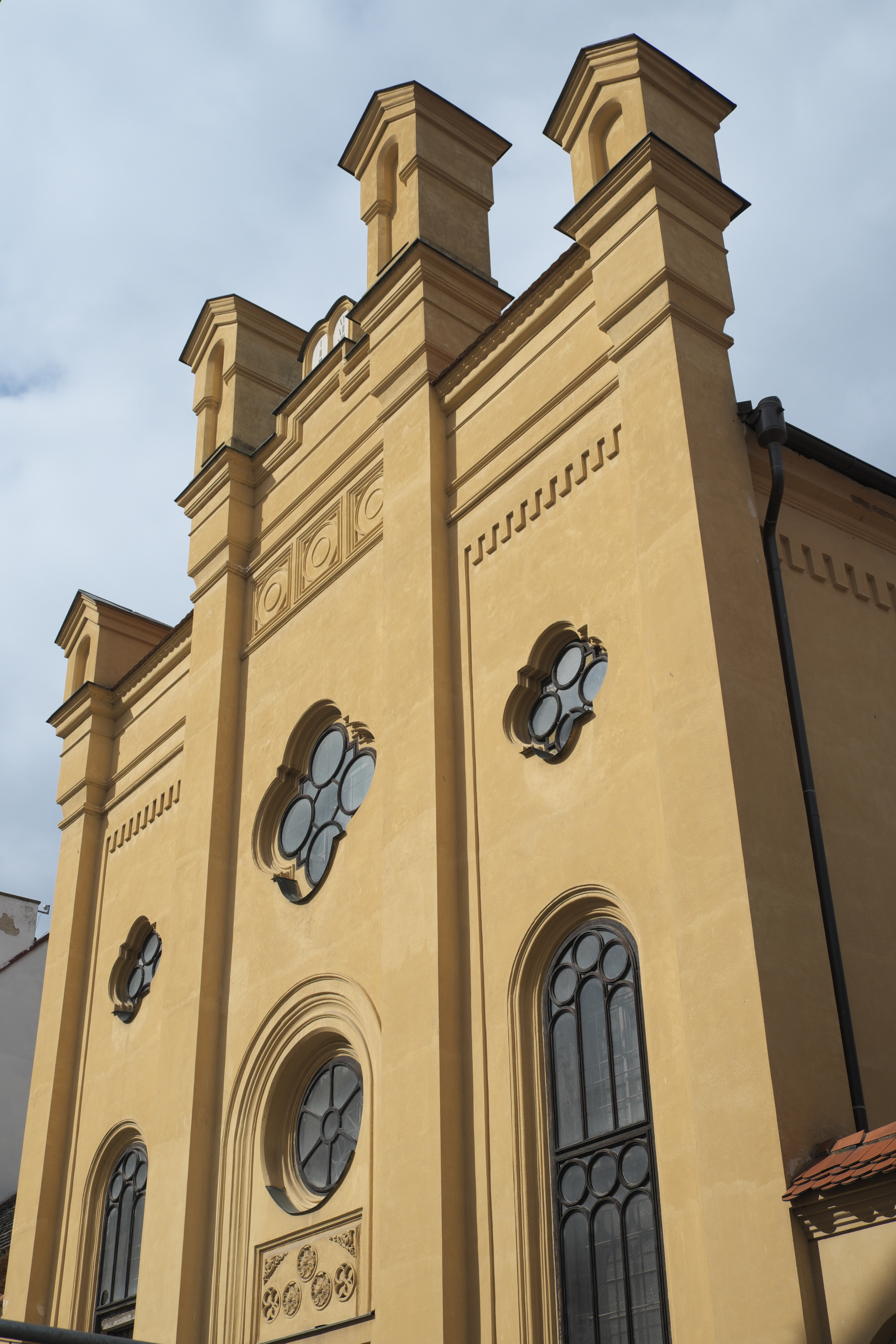 Synagoge in Písek (Südböhmen/Tschechien)